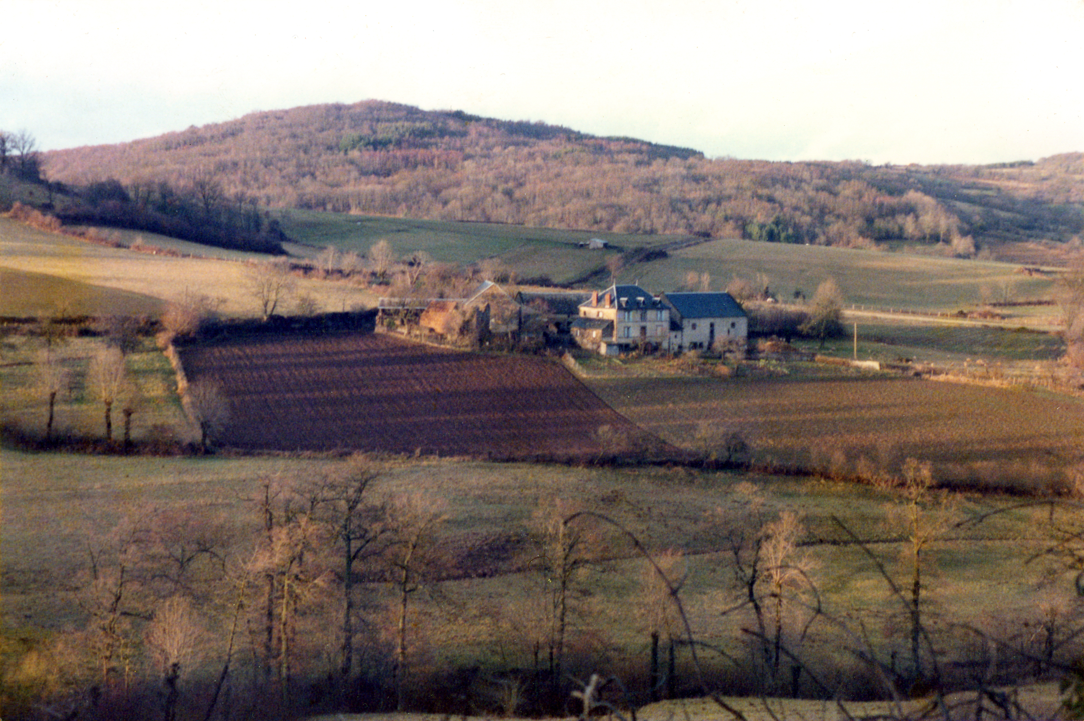 Photographie du hameau de Montiroir situé au pied du volcan du puy de Montiroir. On aperçoit, à gauche du hameau, les ruines d'une vielle tour médiévale aujourd'hui démolie. Le membre wiki "Nolège" est l'auteur de cette photographie prise dans les années 1980. Il autorise à ce que ce document soit publié selon les termes de la GFDL.